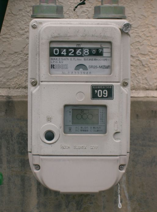 Gas meter